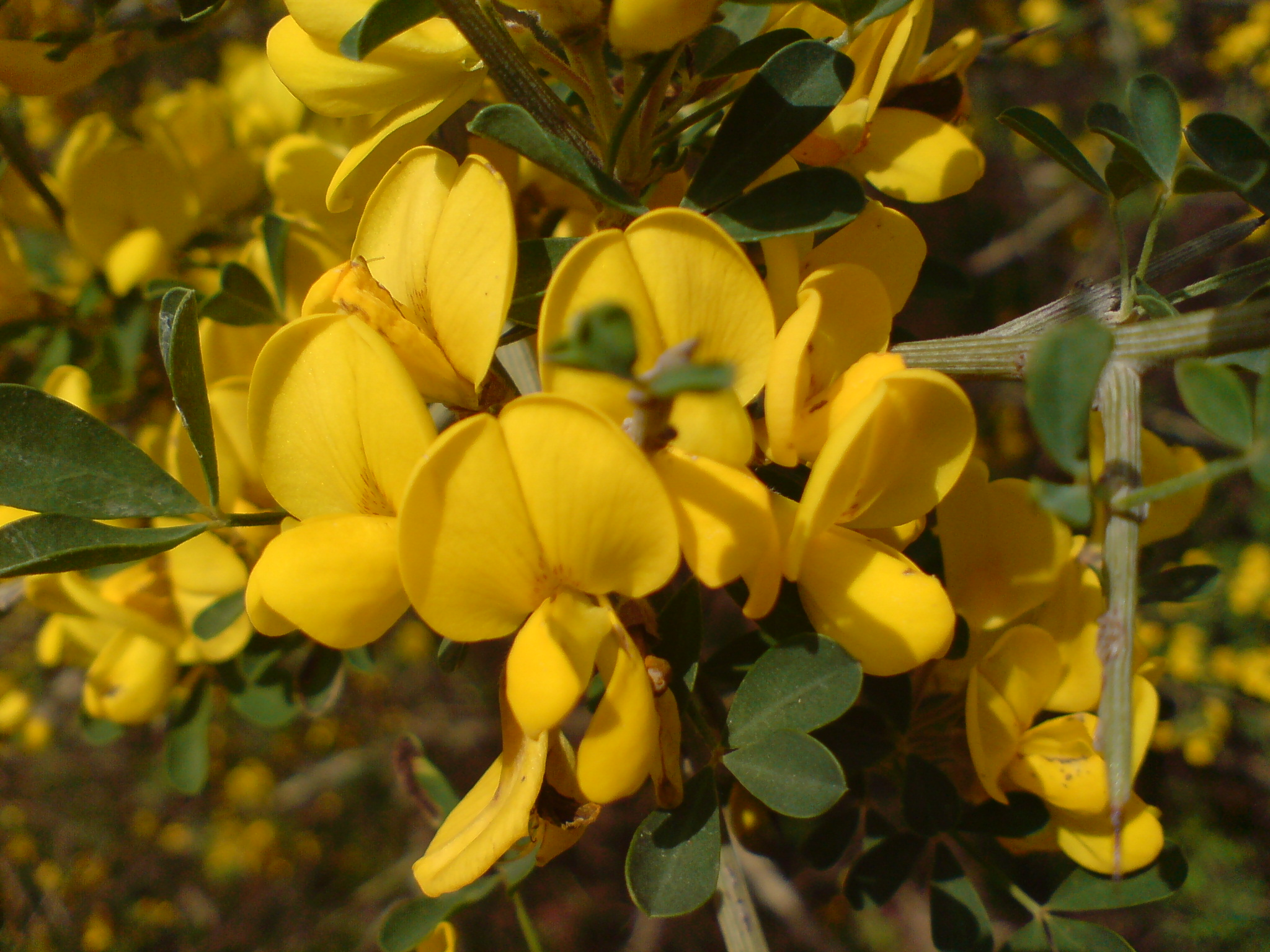 קידה שעירה